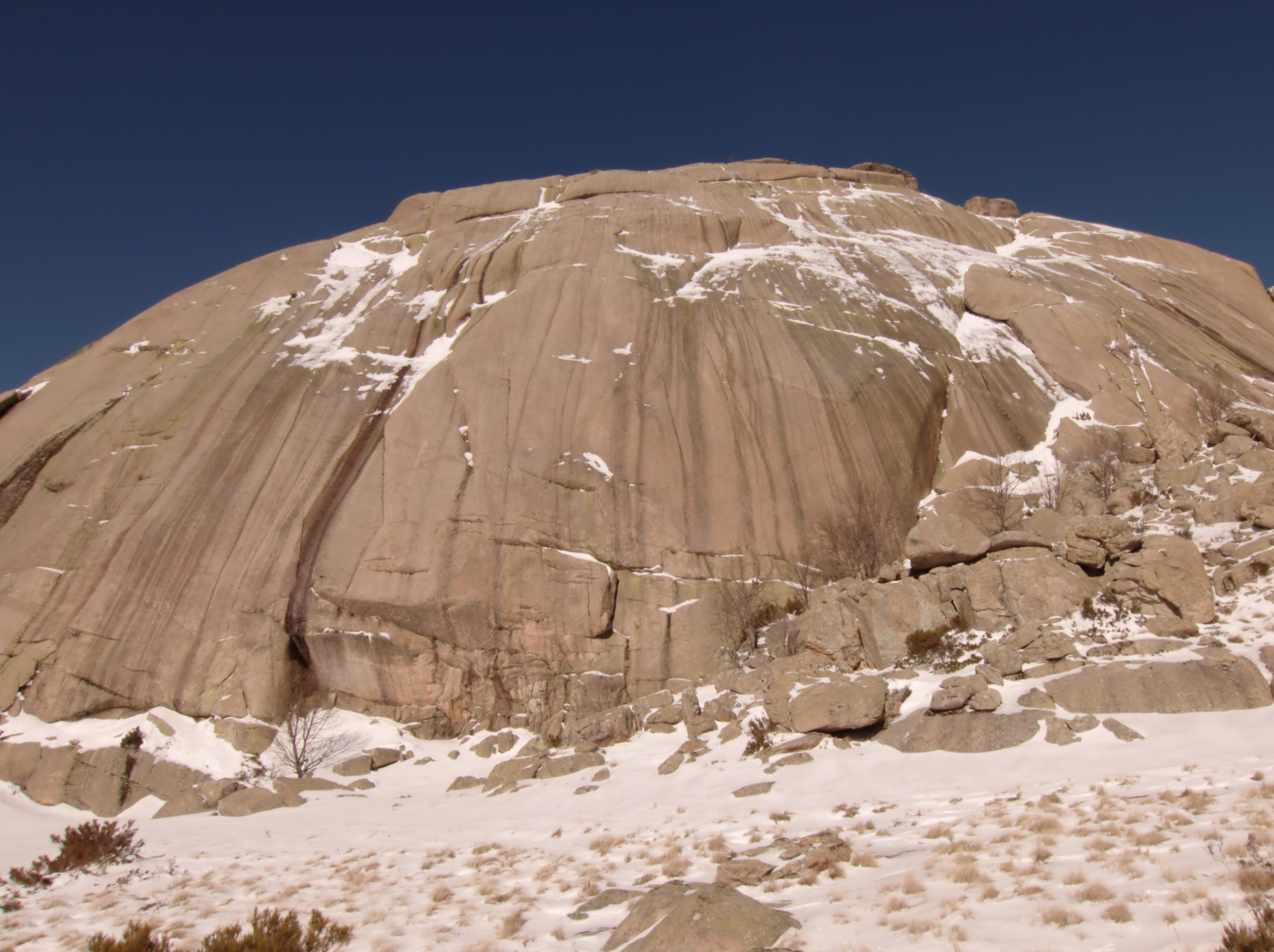 La Pedriza